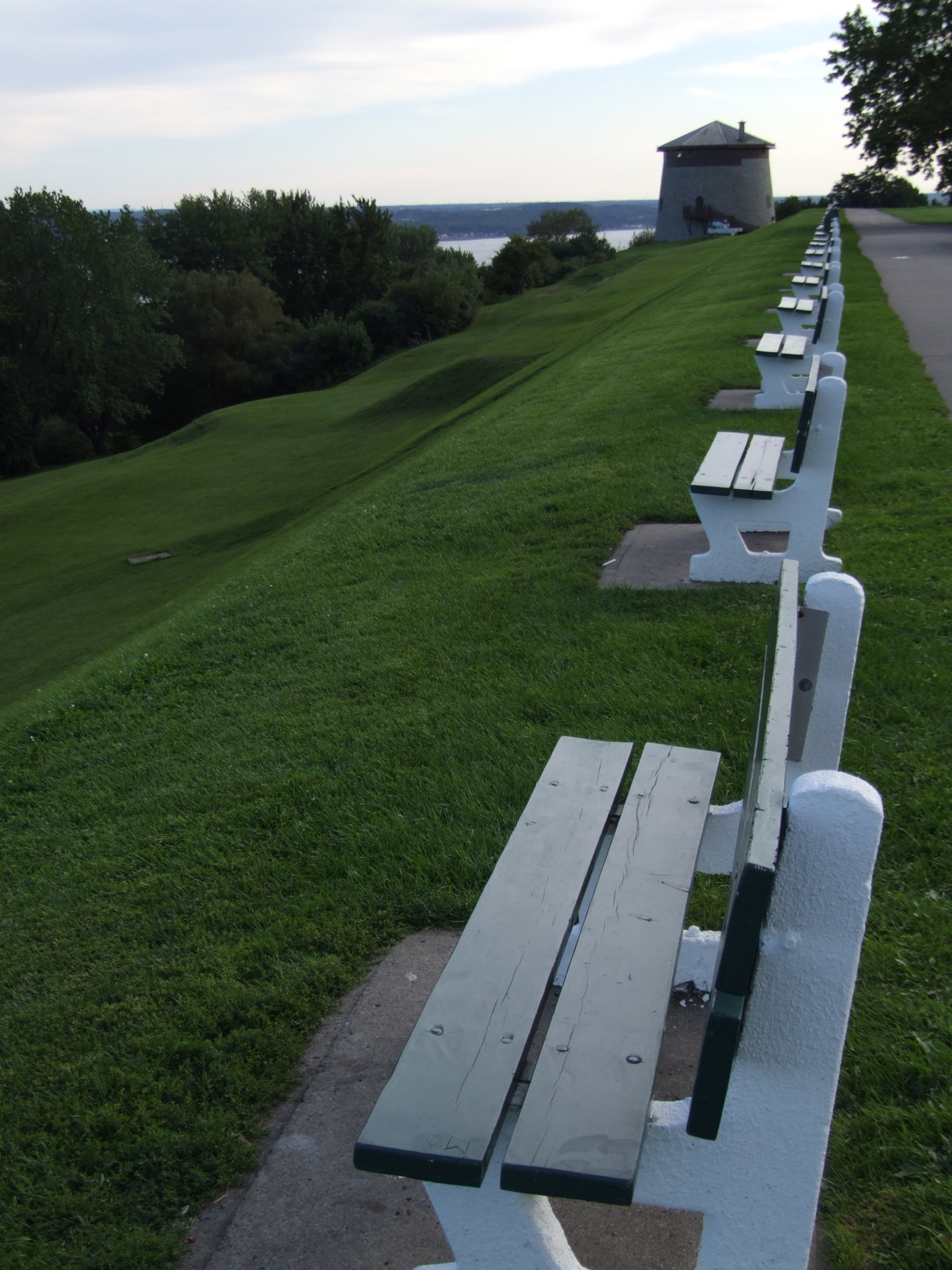 Tour Martello numero 1, plaine d'Abrahams, ville de Québec, CANADA